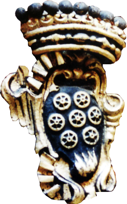 Blason du capitoul de Toulouse Joseph Cerou